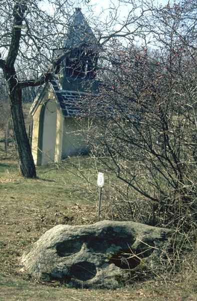 Der Heilige Stein in Mitteretzbach mit Kapelle